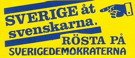 "Sverige åt svenskarna". Klistermärke från Sverigedemokraterna.